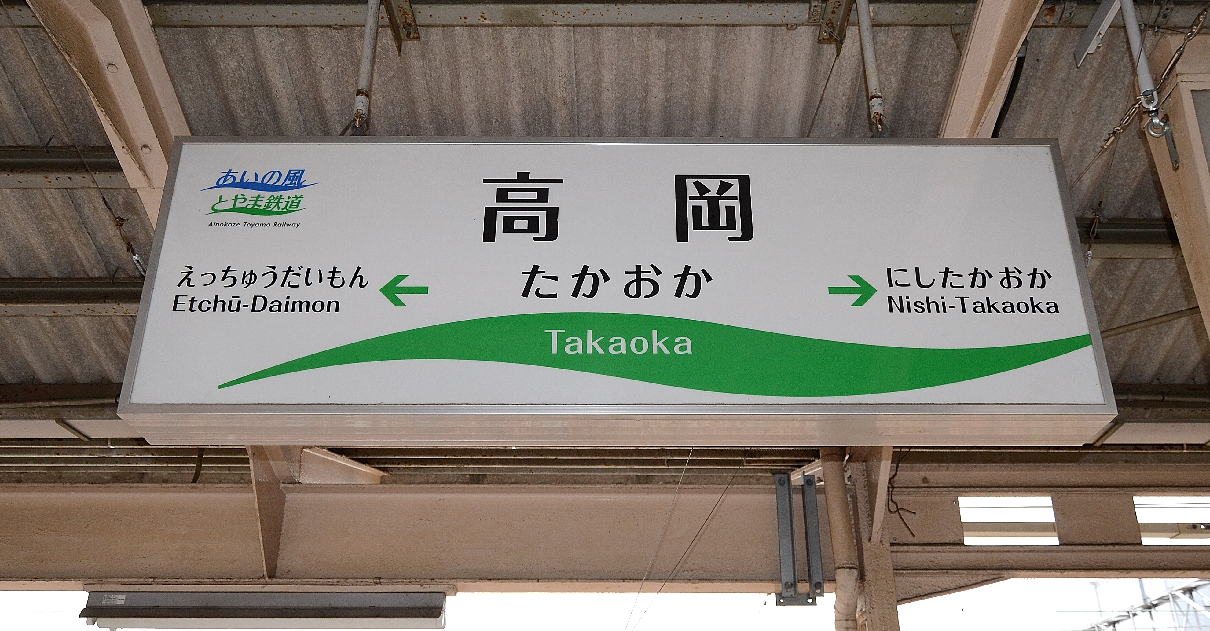 あいの風とやま鉄道線の山側の駅名票。